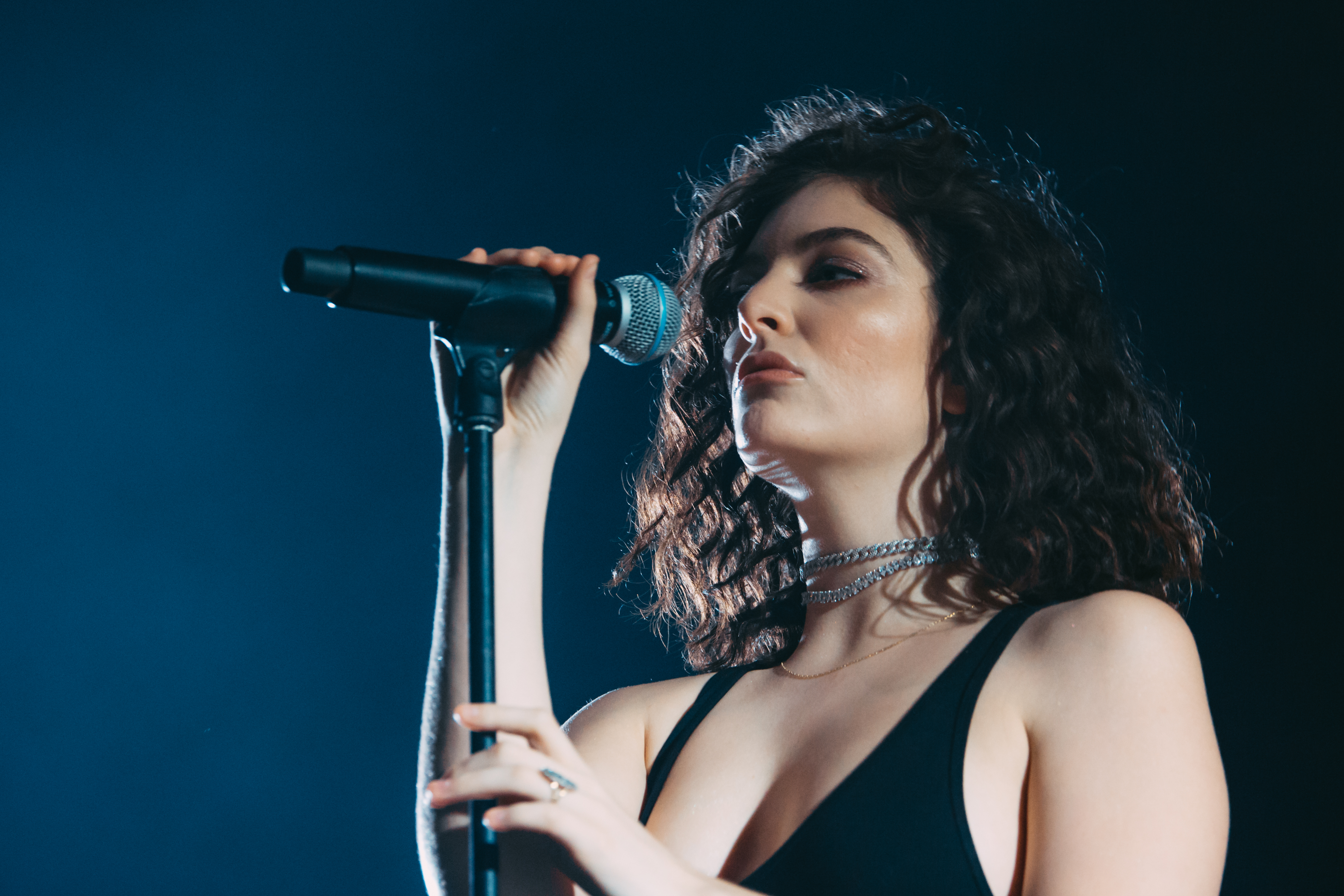 Photo: Krists Luhaers // @Kristsll